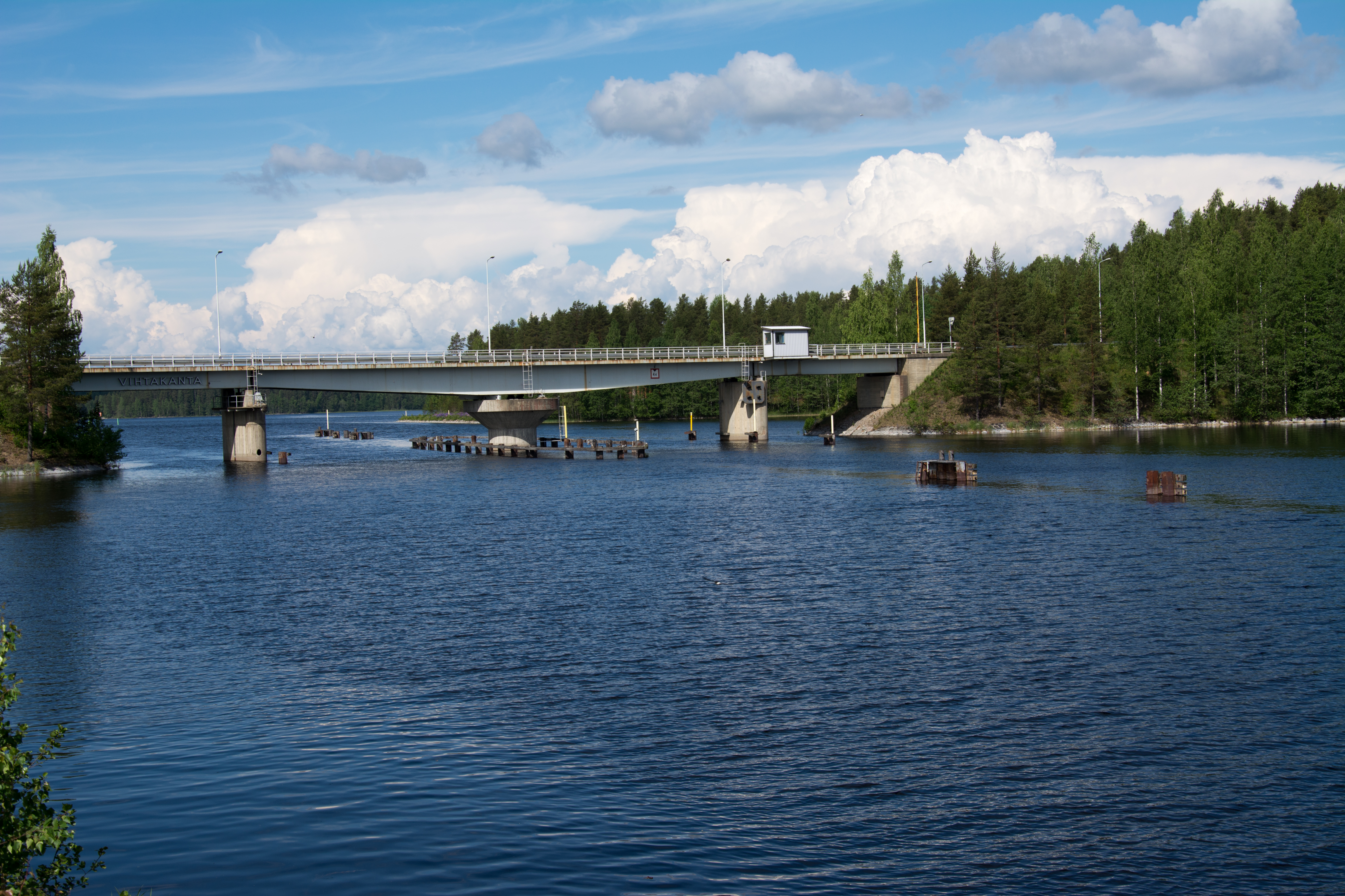 Vihtakannan kanava